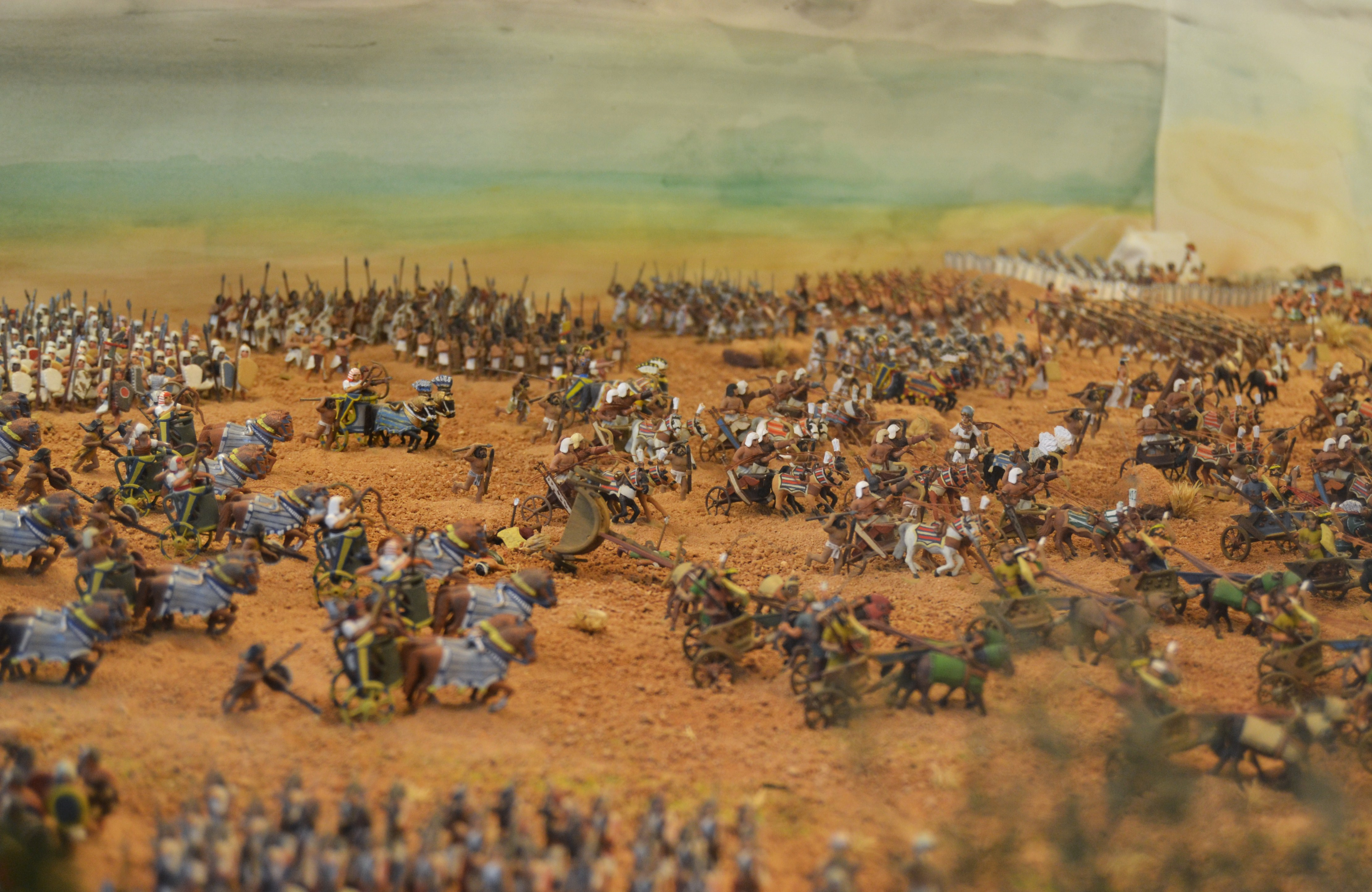 Museu dels soldadets de Plom l'Iber, batalla de Cadeix.